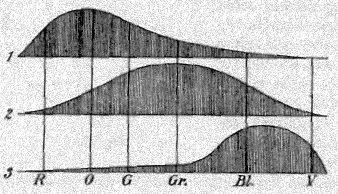 Spektrale Lichtempfindlichkeiten der Zapfen im menschlichem Auge